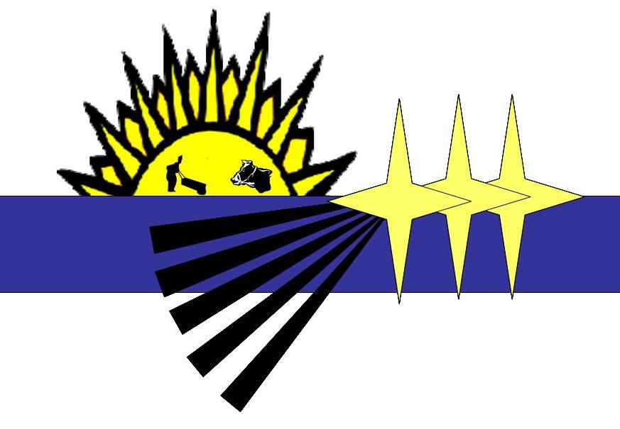 Bandera del municipio Valmore Rodriguez